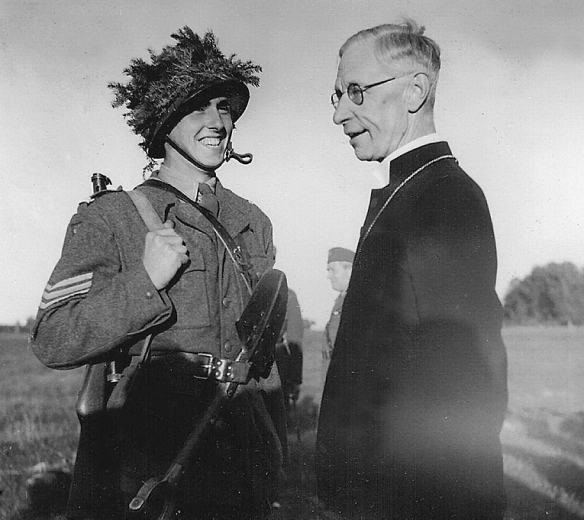 Gustaf Aulén blev biskop när Hitler blev rikskansler, och engagerade sig under kriget starkt i kampen mot nazismen.